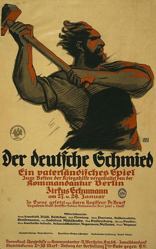 Der deutsche Schmied. Ein vaterländisches Spiel zum Besten der Kriegshilfe...., lithograph, color; 73 x 47 cm, 1915